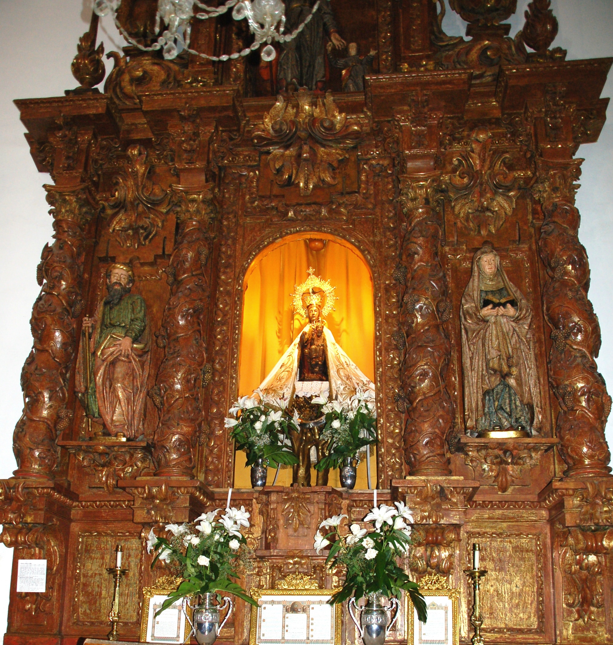 Retablo_en_Basilica_de_Lequeitio,_Vizcaya